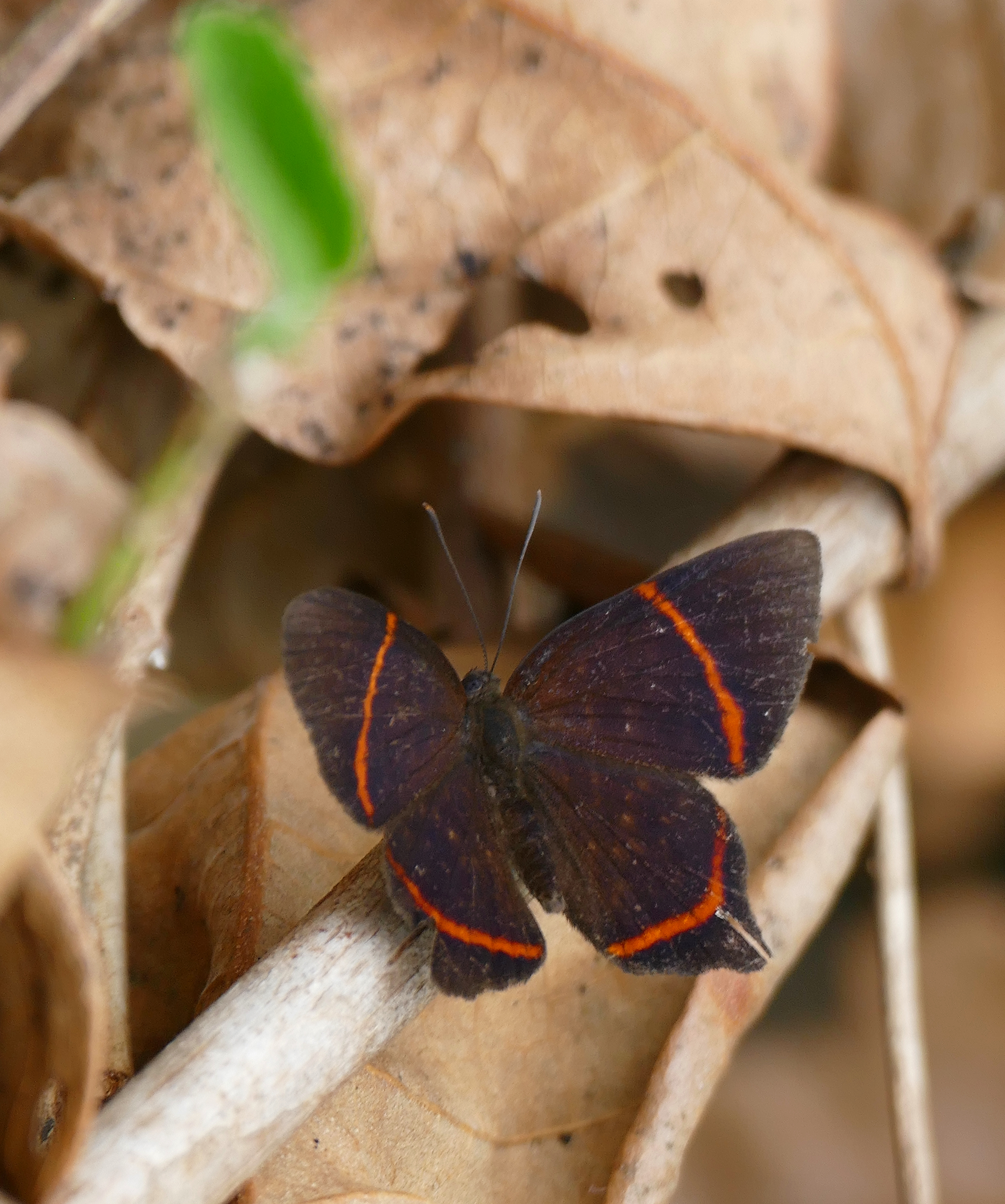 Pixaim, Transpantaneira, Poconé, Mato Grosso, BRAZIL